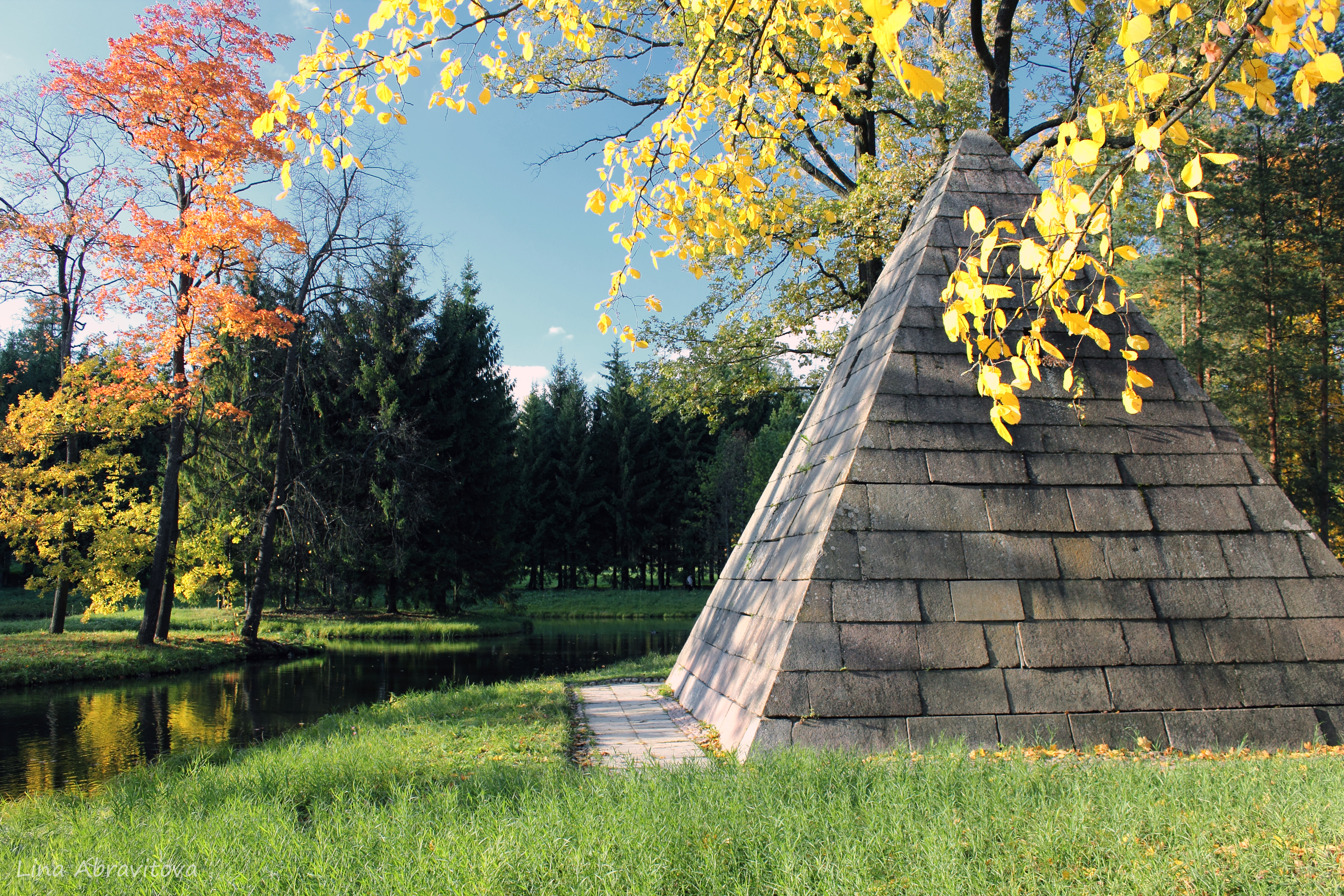 Пирамида с четырьмя колоннами (Санкт-Петербург и Лен.область, Пушкин, у Палладиева моста)